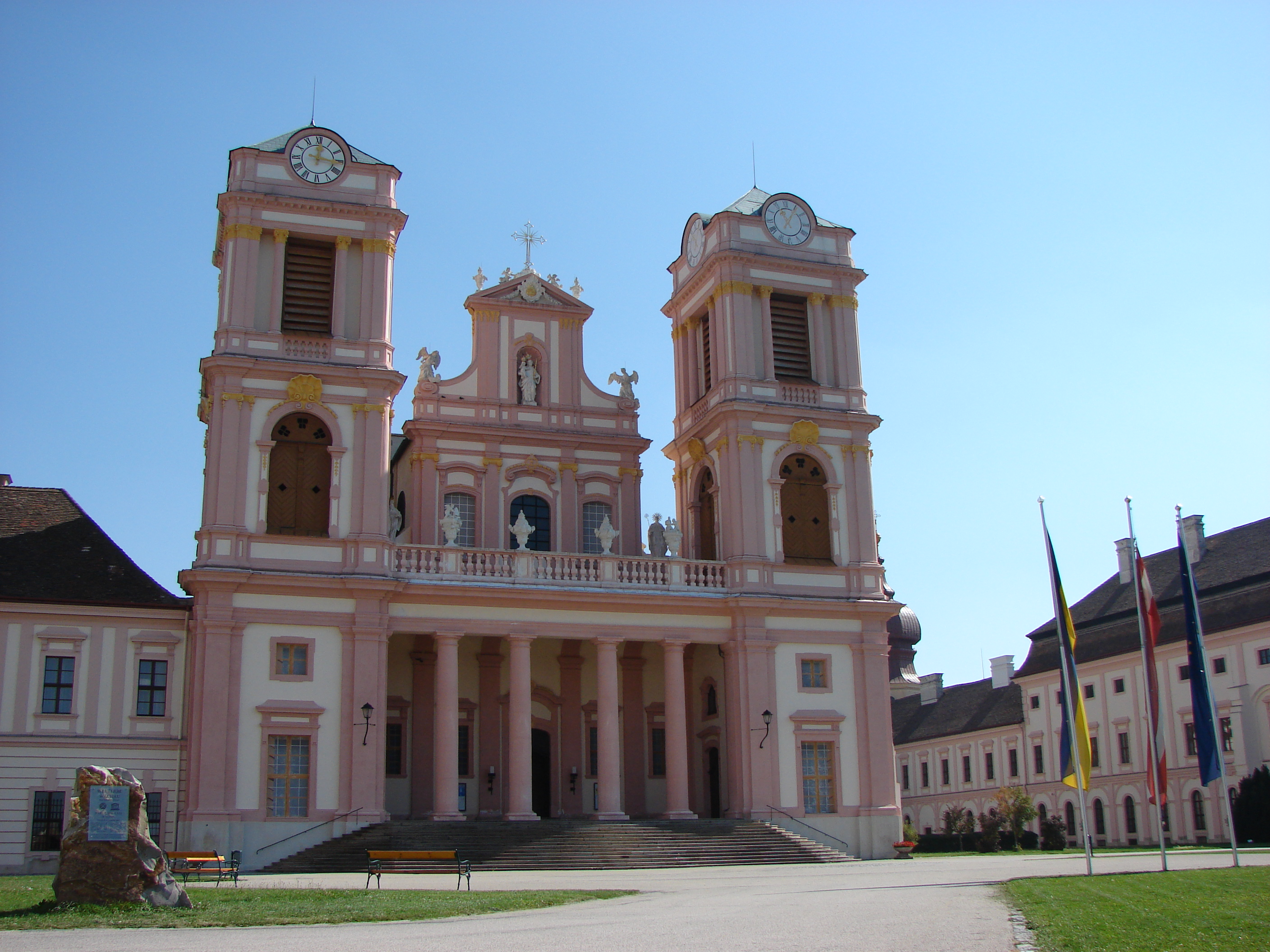 Stift Göttweig, Österreich. Stiftskirche